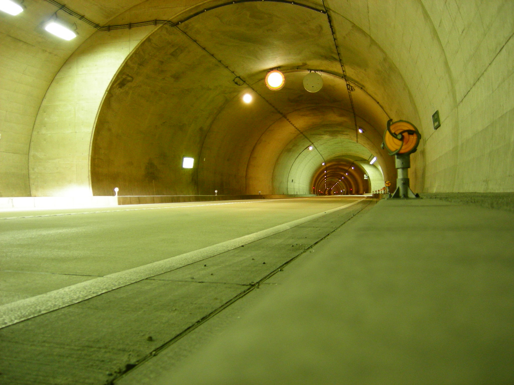 群馬県道62号バイパス楡高トンネル内部非常駐車帯より撮影